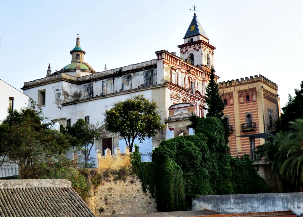 glesia de La Merced desde el Museo del Mar